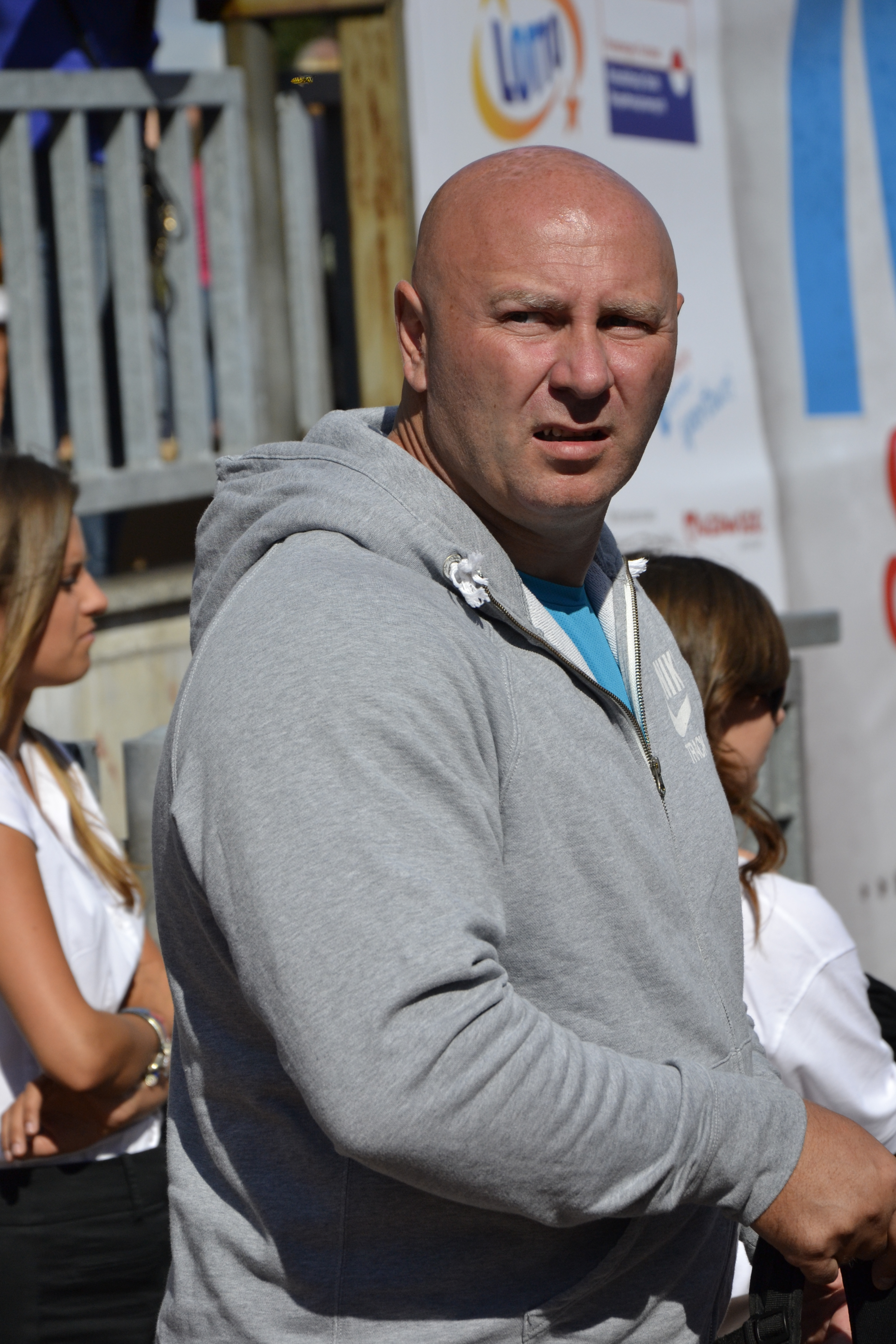 Szymon Ziółkowski na 4. Mityngu im.Kamili Skolimowskiej